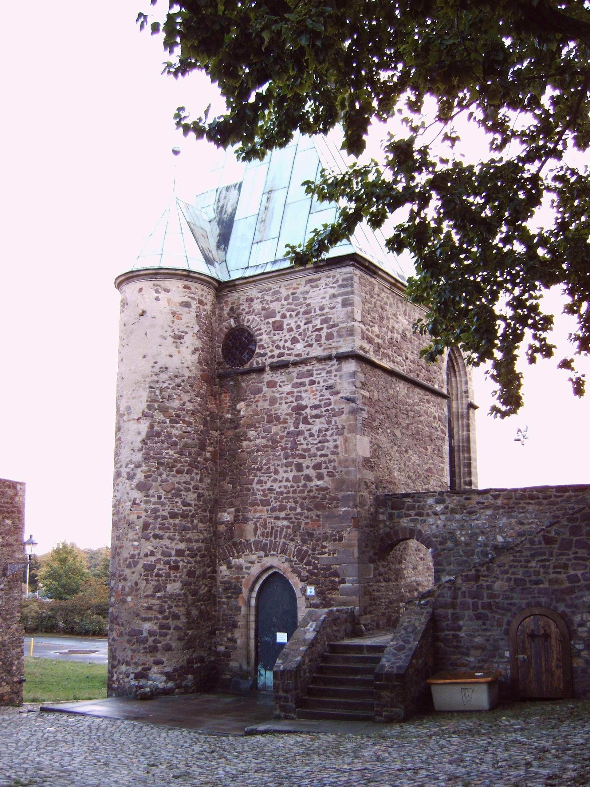 Magdalenenkapelle in Magdeburg, Westseite, Bild aufgenommen am 26. September 2005, durch Benutzer:Olaf2